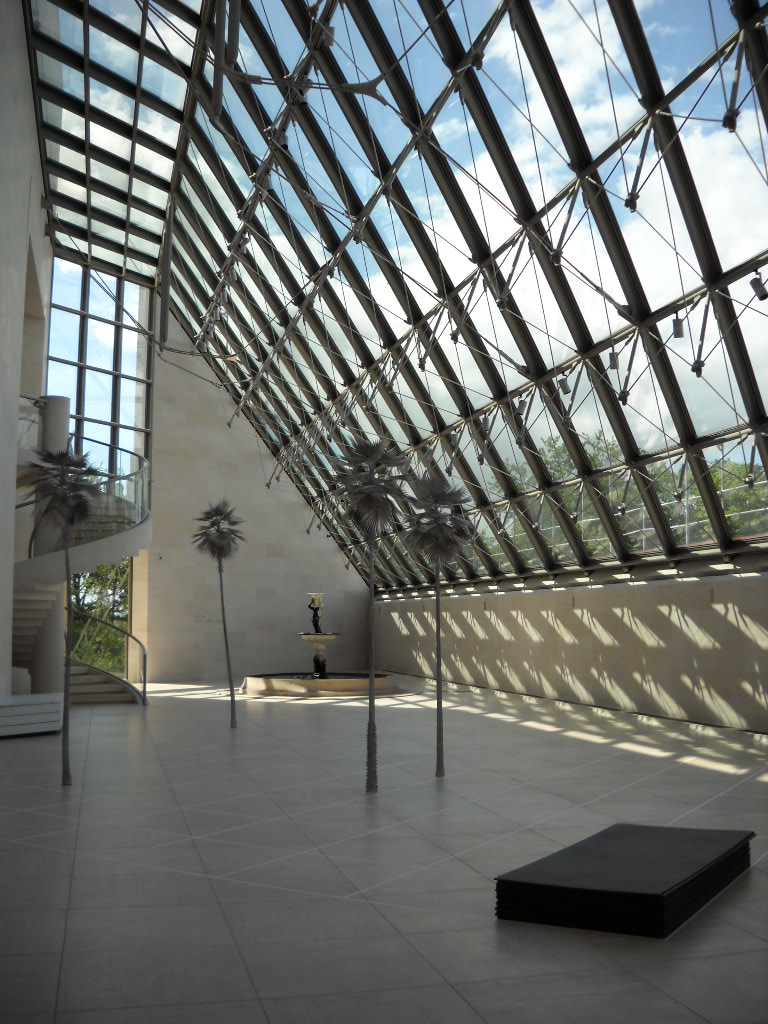 MUDAM interno